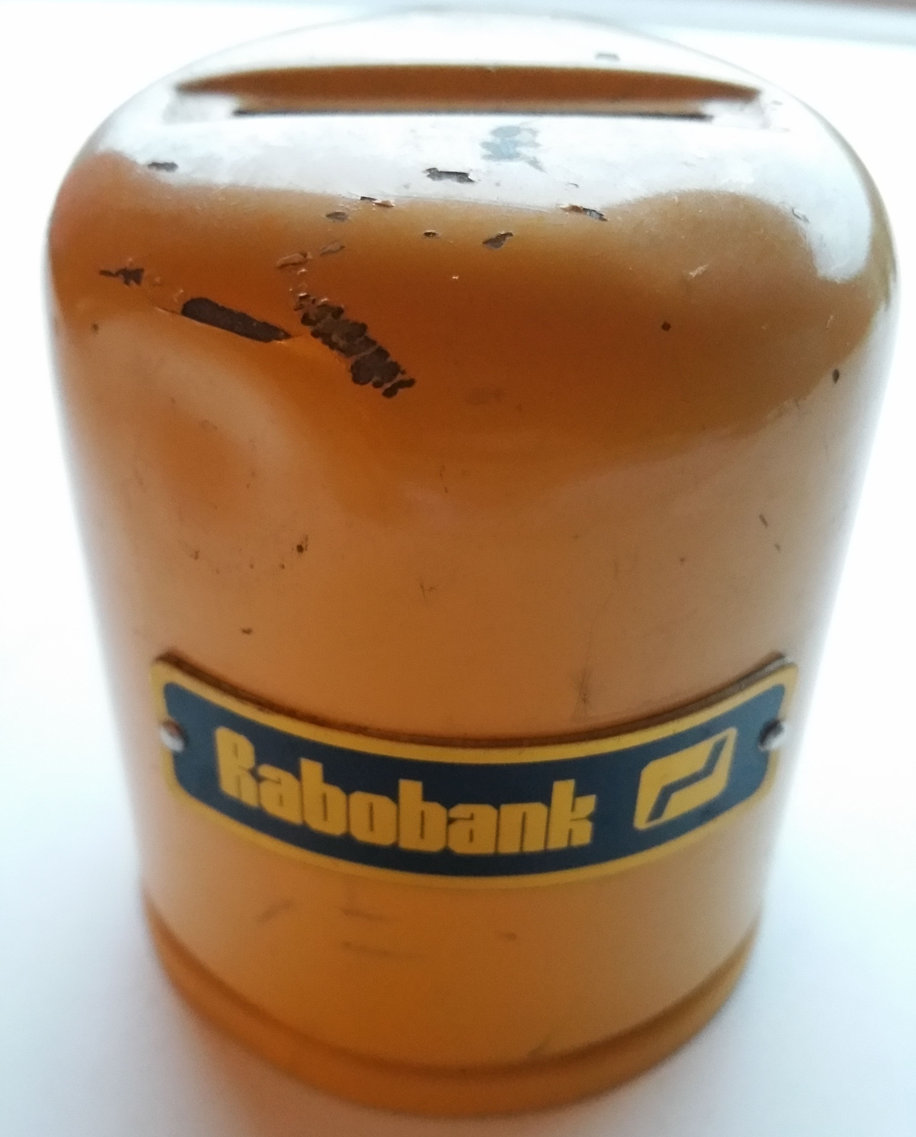 Rabobank spaarpot uit de jaren 70 met het oude logo